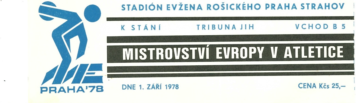 Vstupenka ME 1978